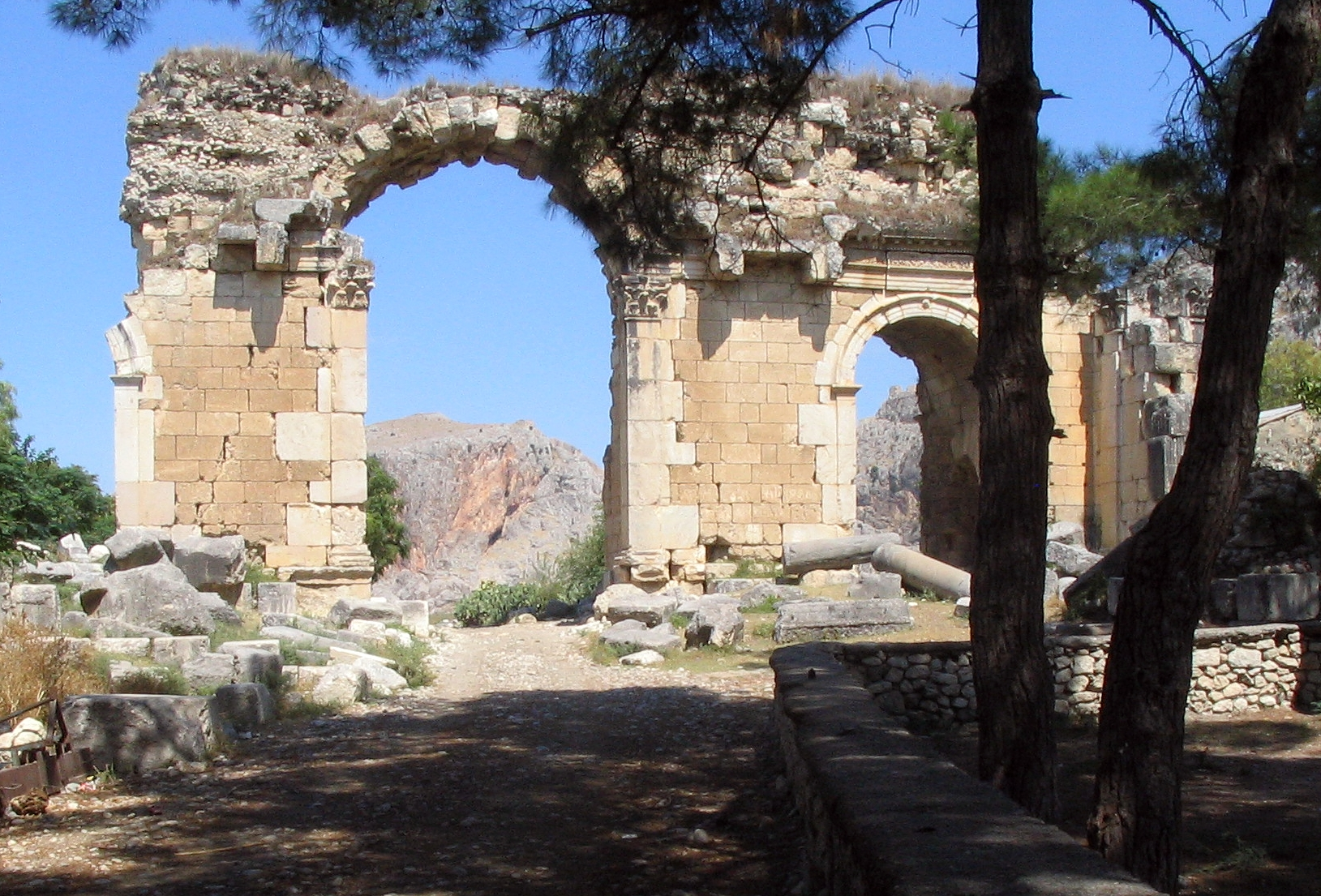 Triumphbogen in Anavarza (Anazarba), Südtürkei bei Adana